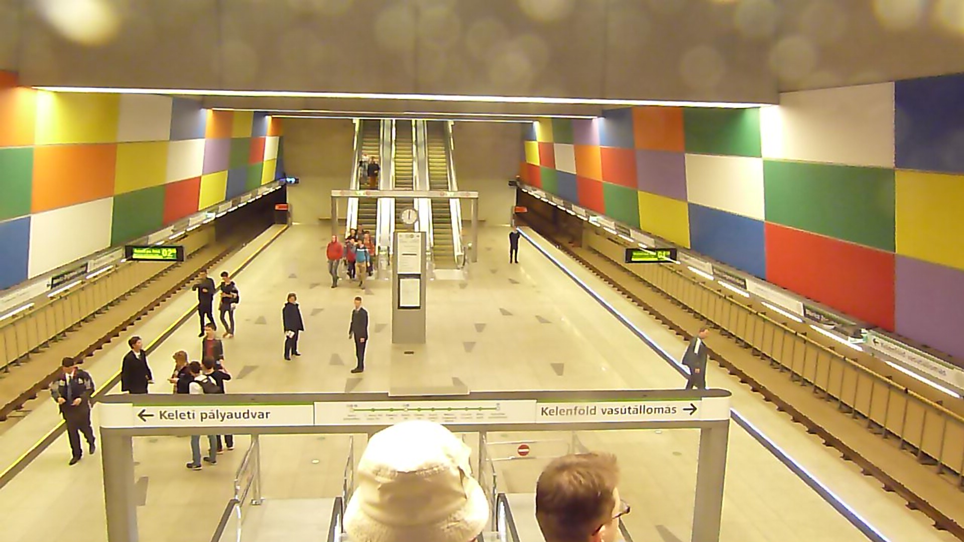 A felvétel 2014. március 28 -án készült, déli 12 óta után néhány másodperccel. Budapest, Móricz Zsigmond körtér M4 megálló, metrószint. ©© Derzsi Elekes Andor, Budapest, 2014, A kép egészben, vagy részletekben másolását, bármilyen úton történő sokszorosítását és felhasználását a szerző ellenérték nélkül, jogutódjaira is kihatóan megengedi. Az engedély kiterjed a kereskedelmi célú hasznosításra is. Kéri azonban nevének feltüntetését a felhasználás során. A Metapolisz sorozat valamennyi képe és filmje Creative Commons alatti valamint kereskedelmi - for profit - célra is felhasználható. Ajánlott hivatkozás: Derzsi Elekes Andor: Metapolisz DVD line